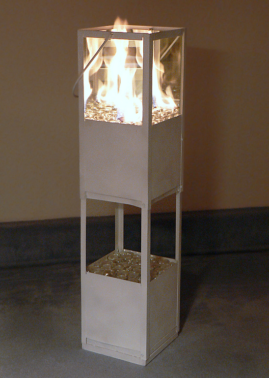 Kaminofen_Ethanol, Selbstbau aus 2 übereinandergesetzten Gartenleuchten mit Petroleumbefeuerung, Made in China (komplett 40 Euro)